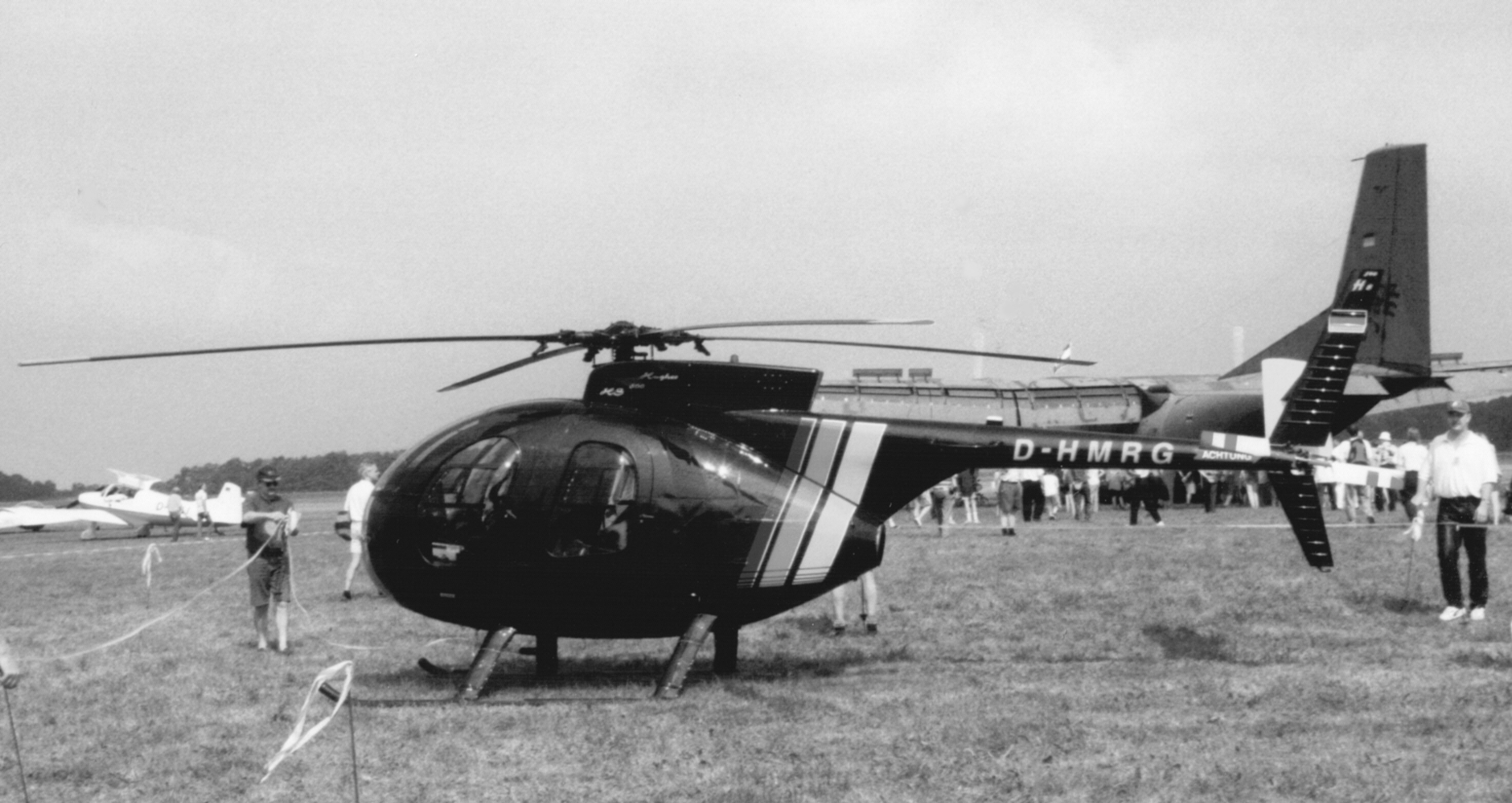 Hghes 500S (D-HMRG) auf dem Flugplatz Uetersen